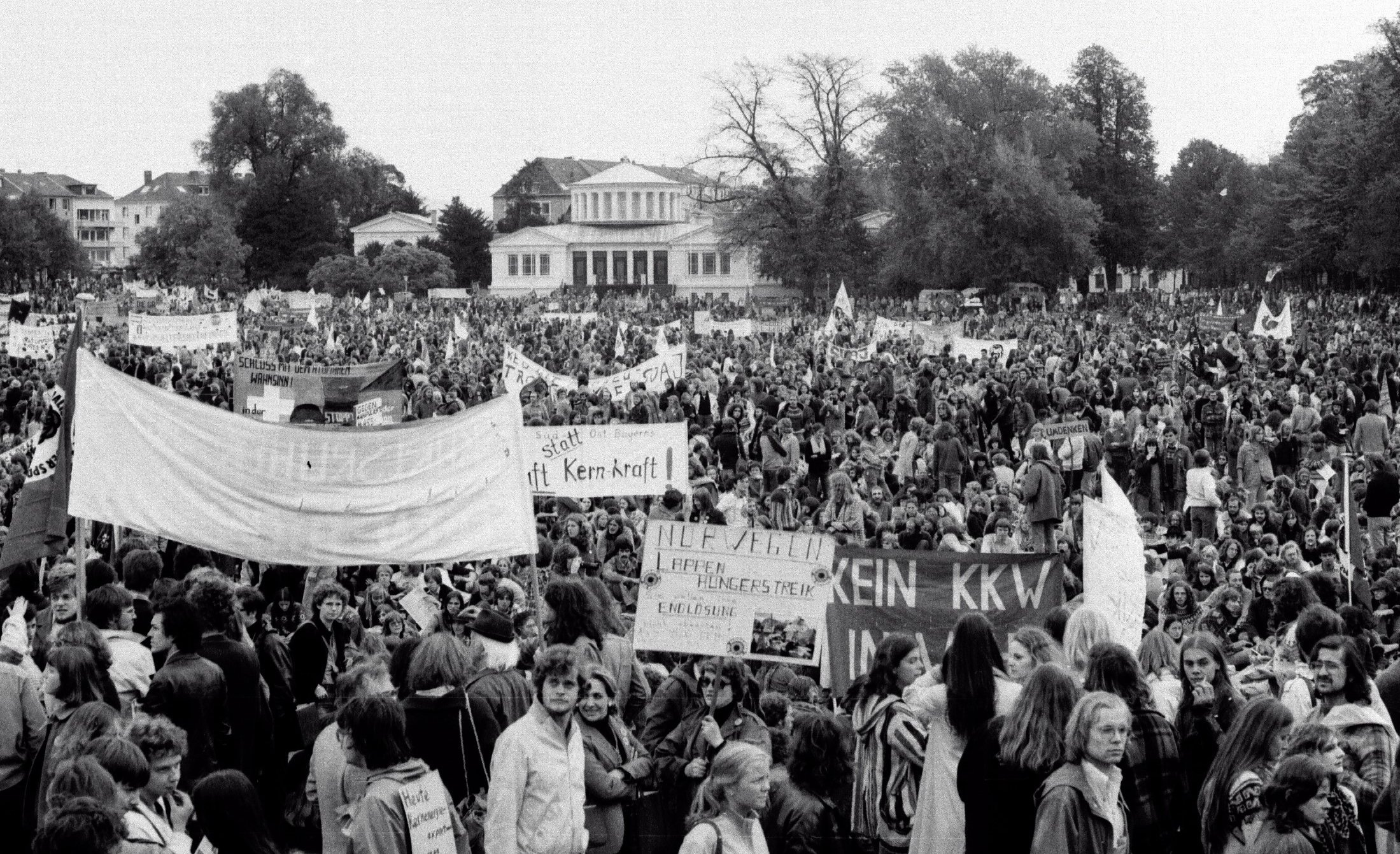 Anti-AKW-Demonstration auf dem Bonner Hofgarten am 14. Oktober 1979